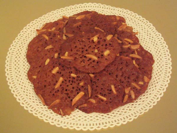 Kletskoppen